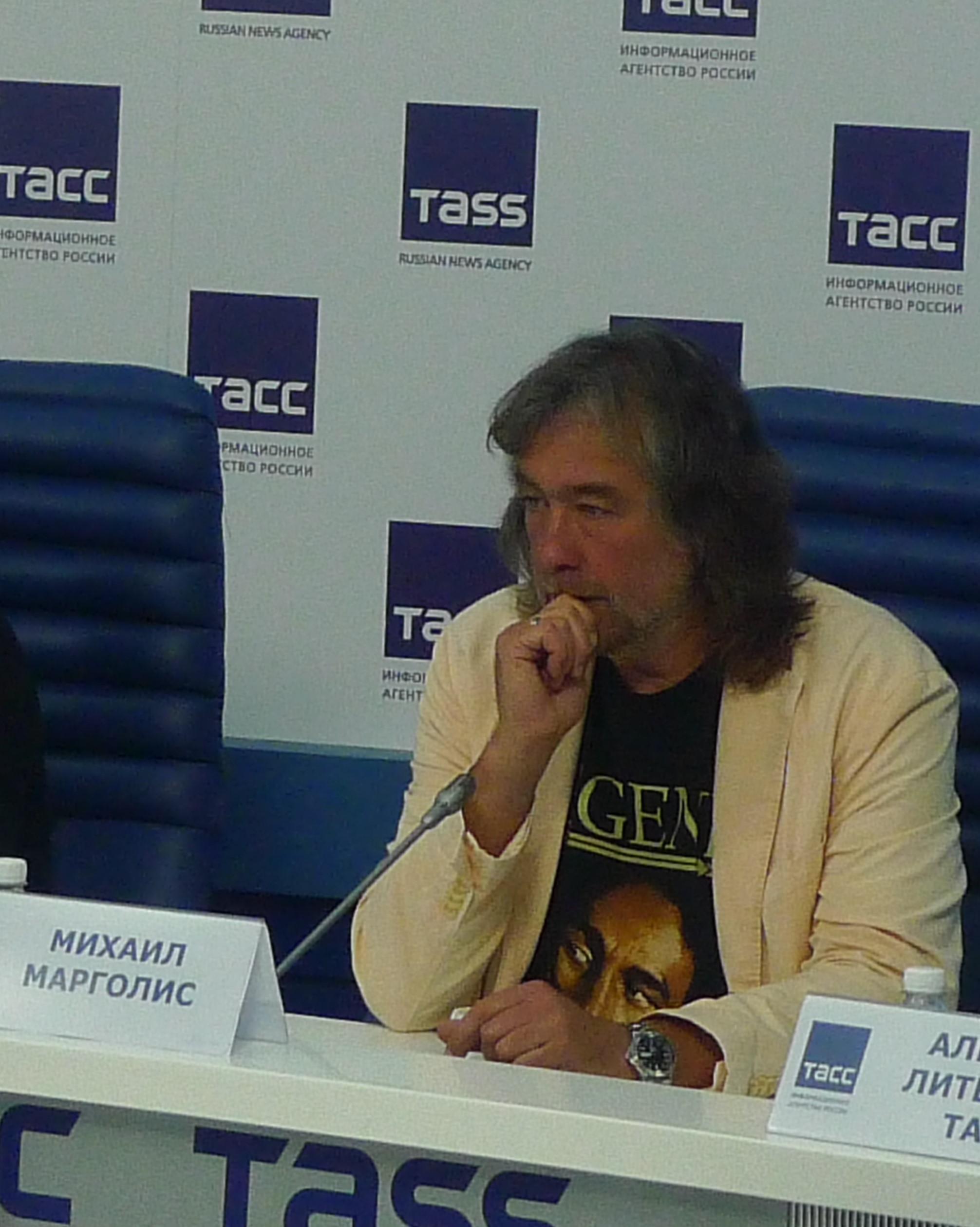 Mashina Vremeni. Polveka v Dvizhenii in ITAR-TASS (2019_06_29)